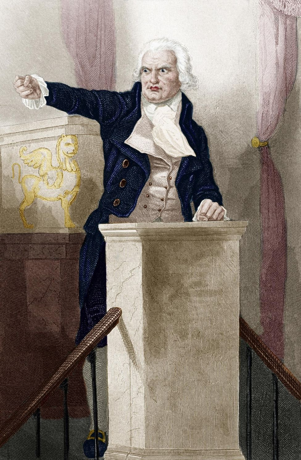 Georges Danton (1759-1794)